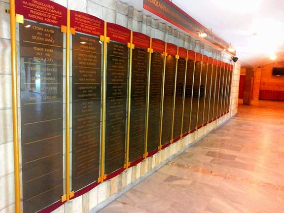 "Стена на славата" в УНСС